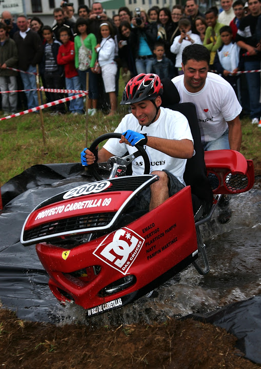 Carretilla de alta competición de la escuderia DcC